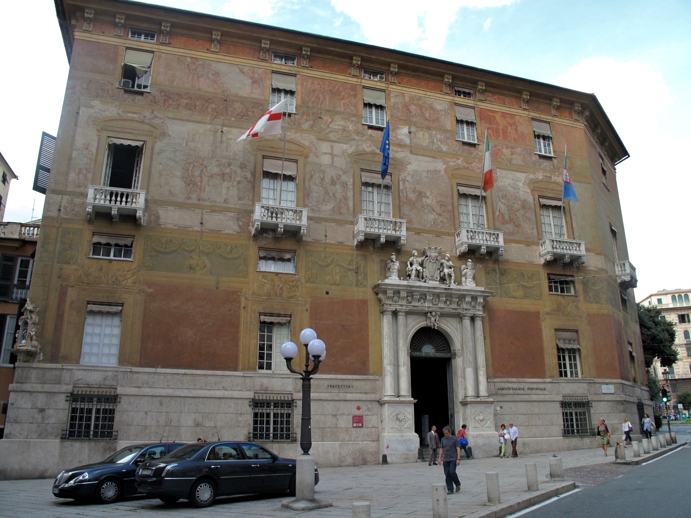 Vacances juillet 2011 en Ligurie